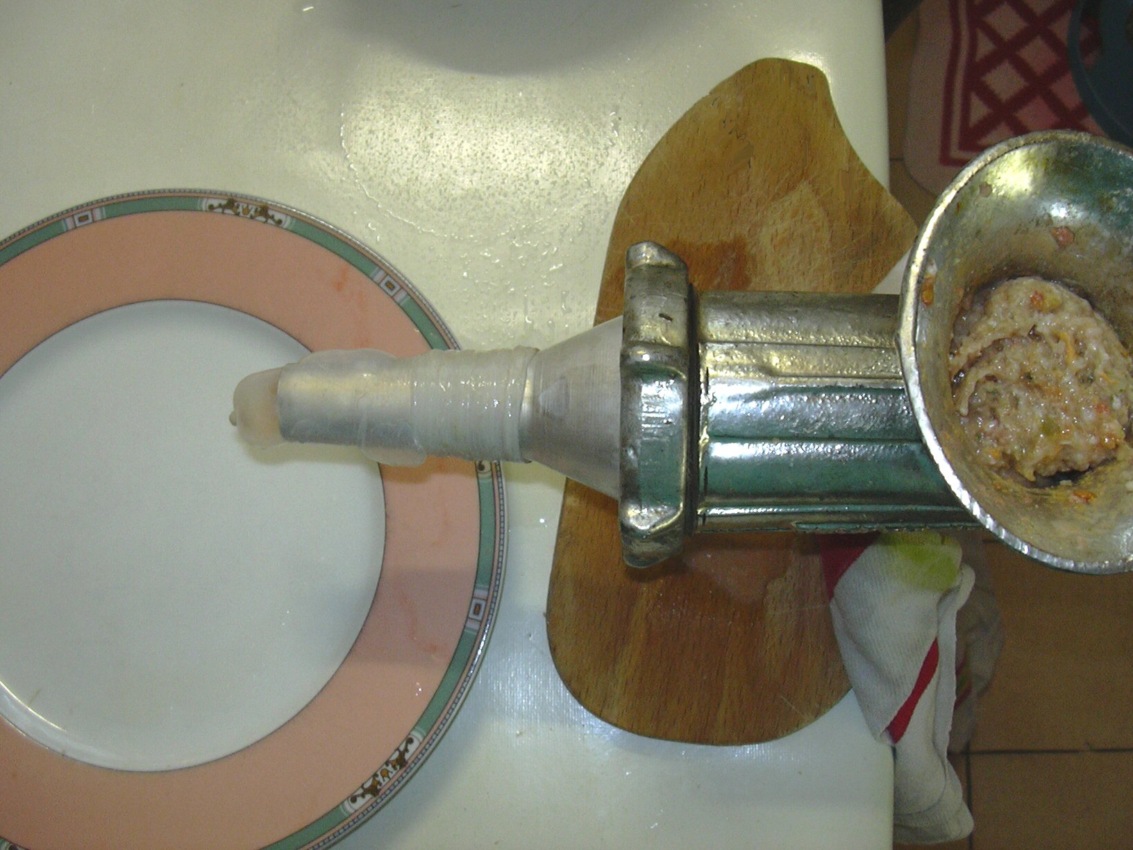 preparation manuelle d'une saucisse